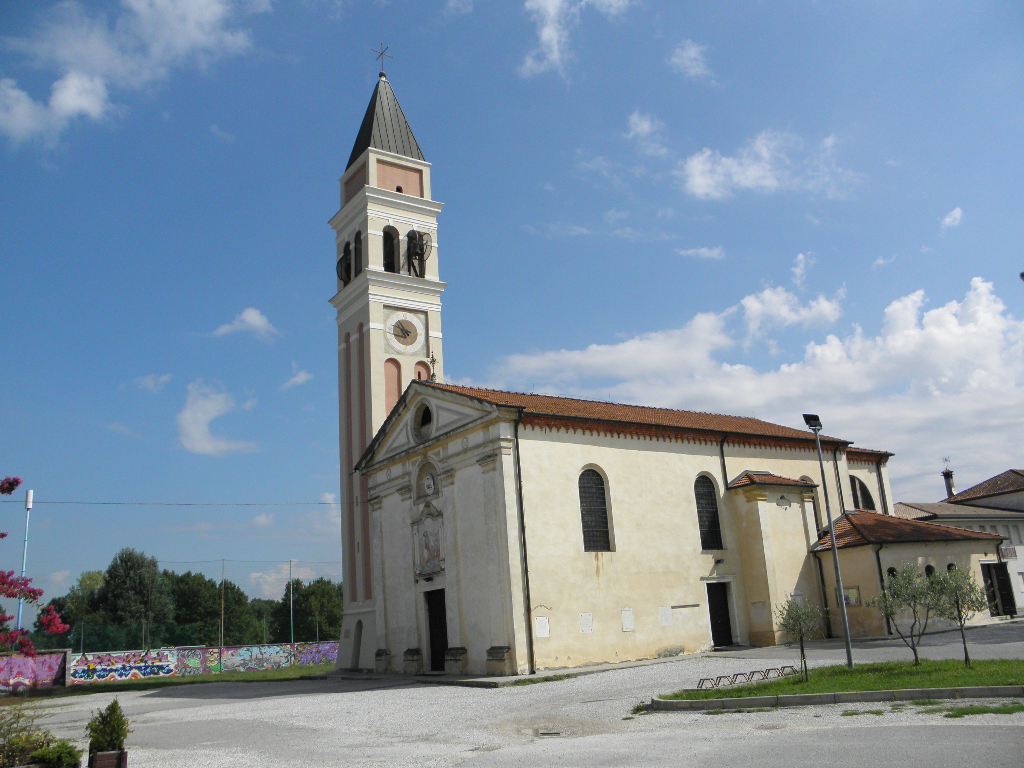 Marcon, la chiesa parrocchiale di San Giorgio.